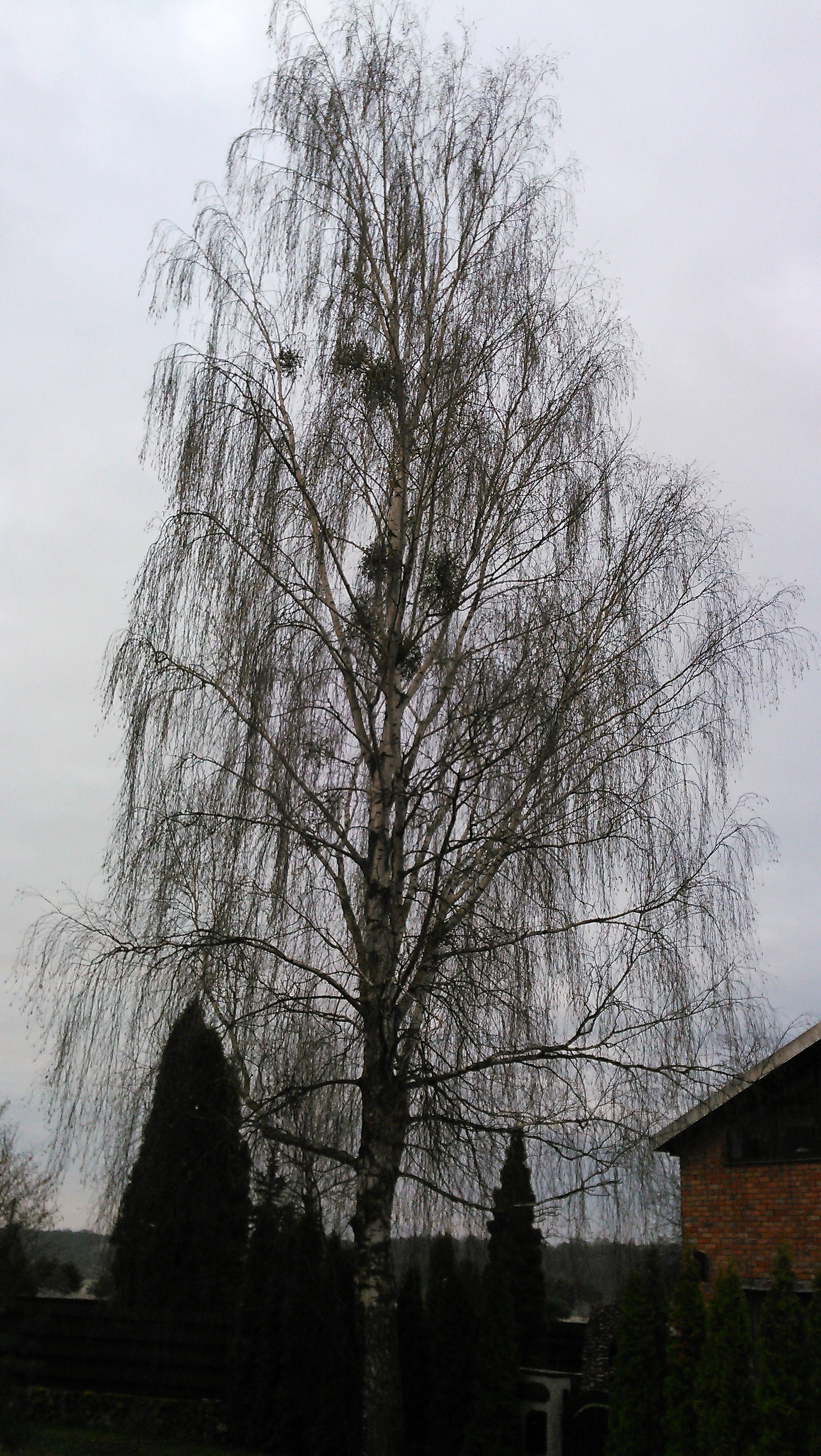 Kulautuva, Kauno raj.